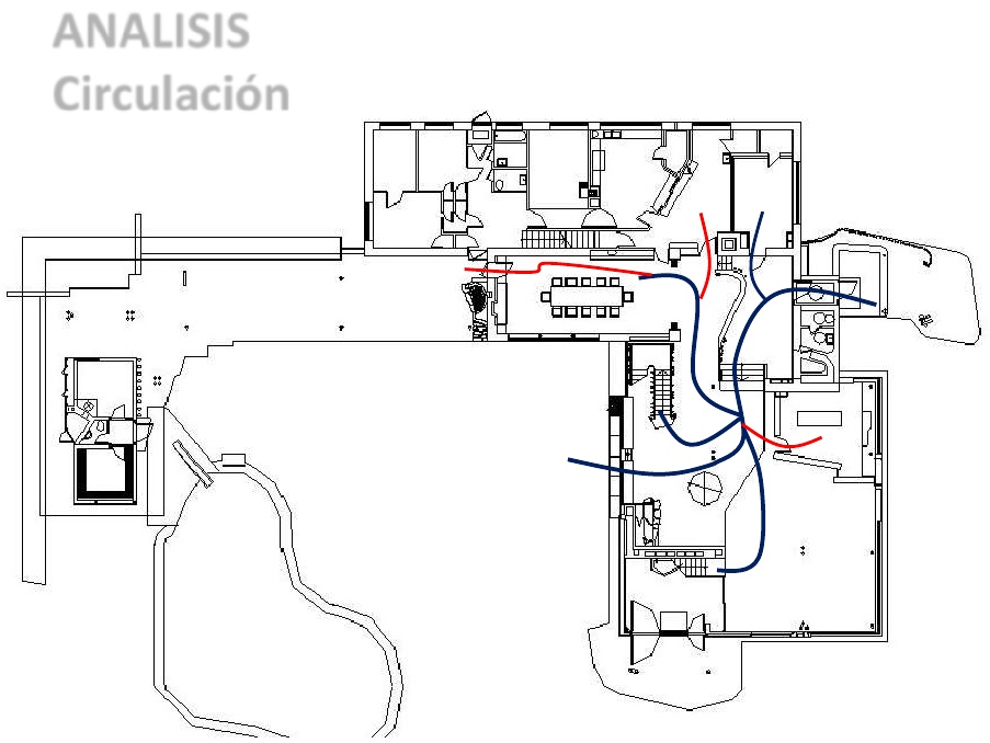 analisis de Circulación